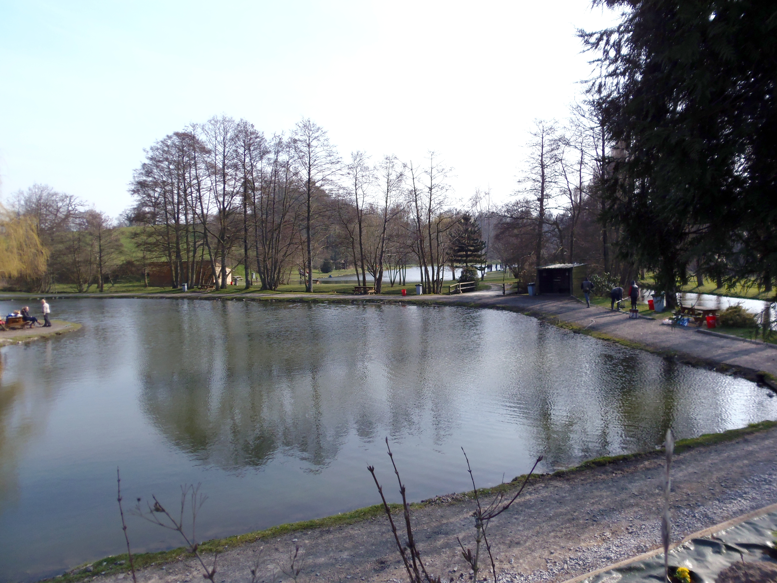 Planquery (Normandie, France). Les étangs.